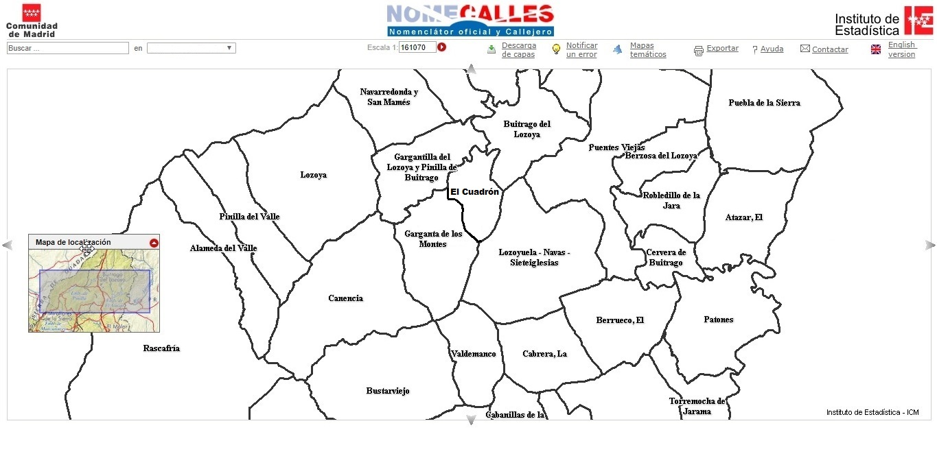 Ubicación de El Cuadrón respecto a los municipios limítrofes de la Comunidad de Madrid